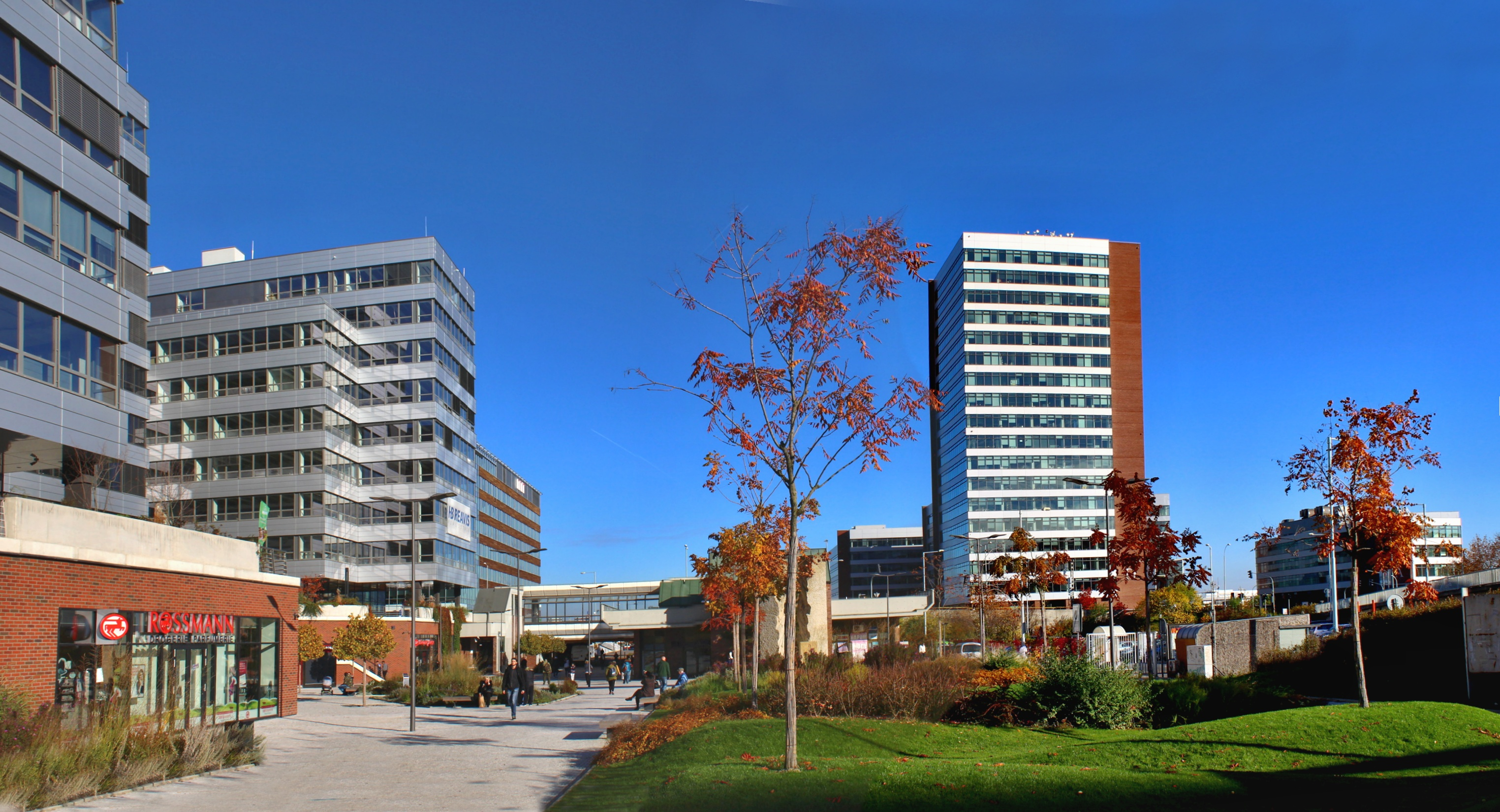 Okolí stanice metra Nové Butovice